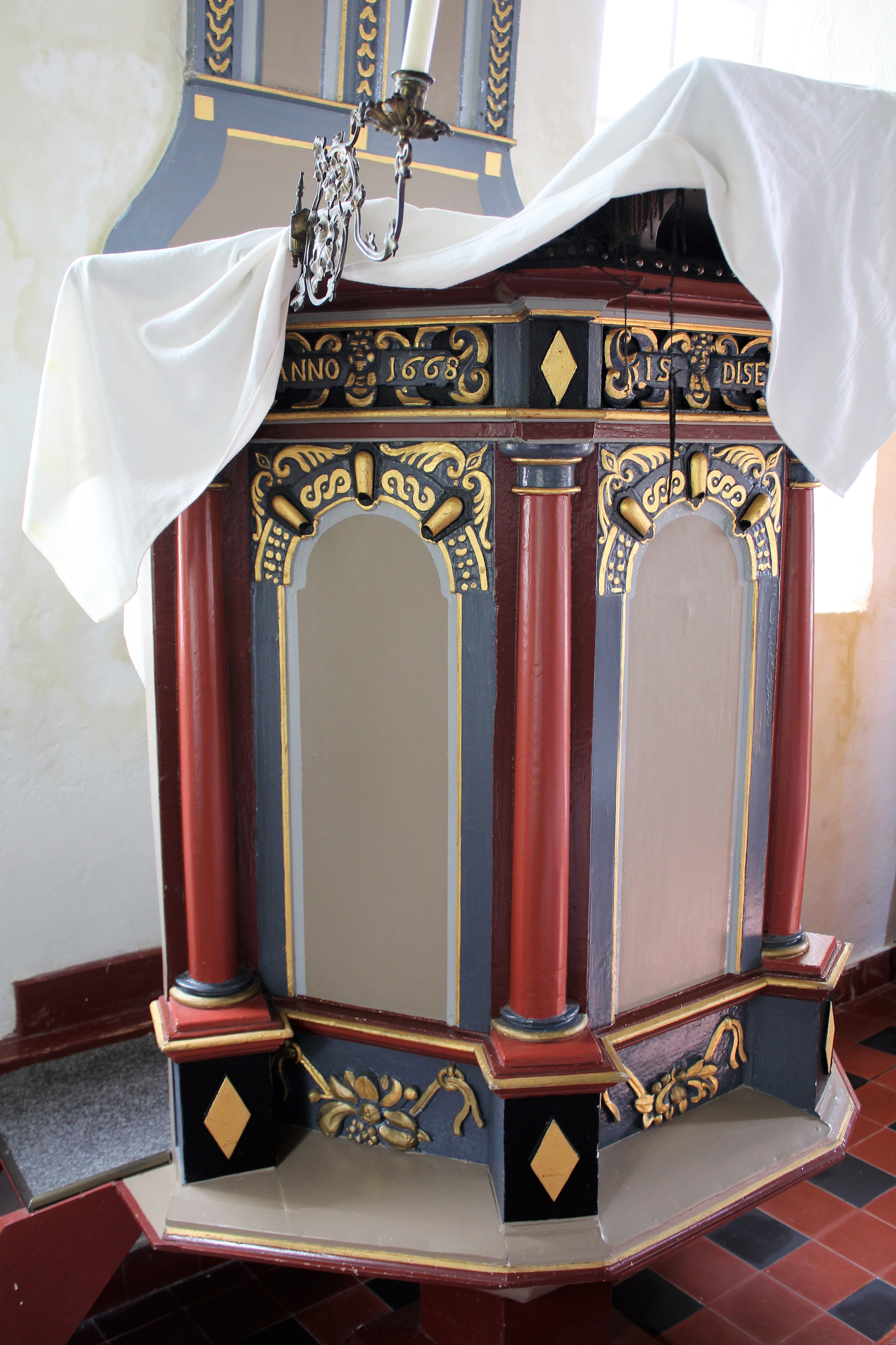 Ev.-reformierte Kirche St. Maria in Marienchor, Gemeinde Jemgum, Landkreis Leer, Ostfriesland, Deutschland